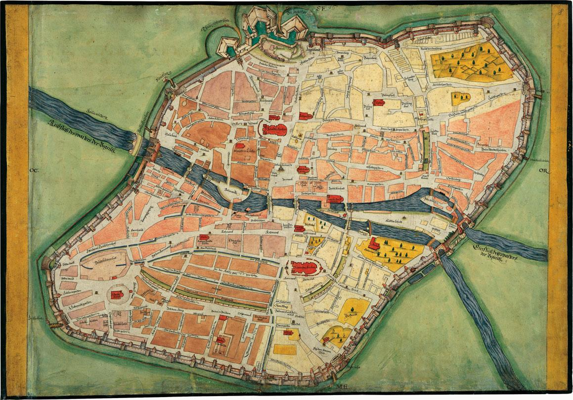 Grundriss der Stadt Nürnberg (Nachzeichnung des frühesten Stadtgrundrisses von 1555, die Georg Nöttelein zugeschrieben wird und auf dem hölzernen Stadtmodell von 1540 beruht)